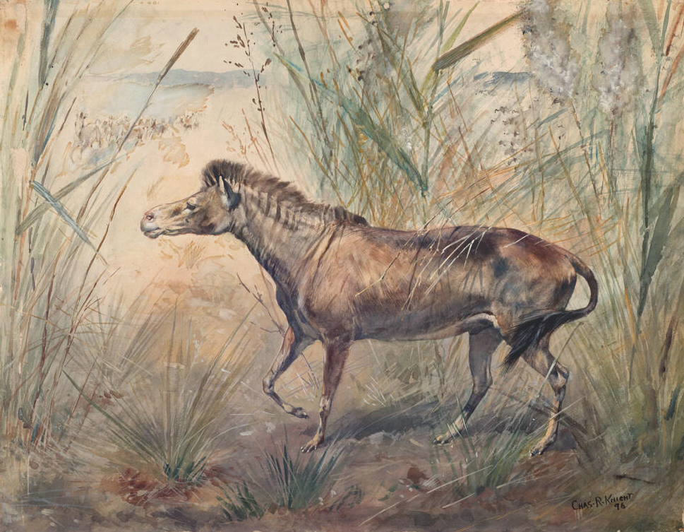 Eohippus.